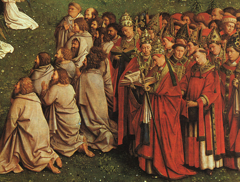 Jan van Eyck (ca. 1390-1441) retaule de l'Anyell místic, Gant (Flandes)